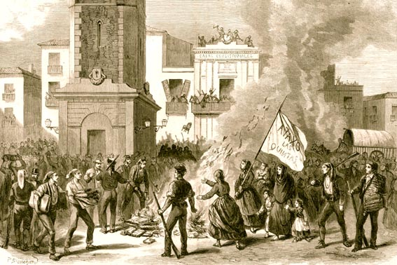 Revuelta de Gracia (1870).